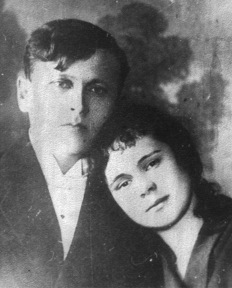 Николай Павлович Шавров (1884 — 1938) — советский фармаколог.